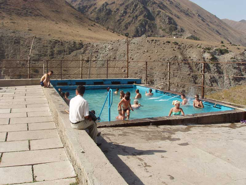 Бассейн за пределами санатория